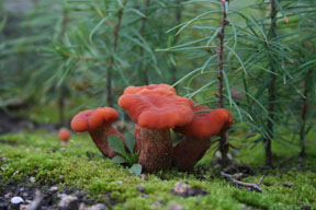 Laccaria fungus.